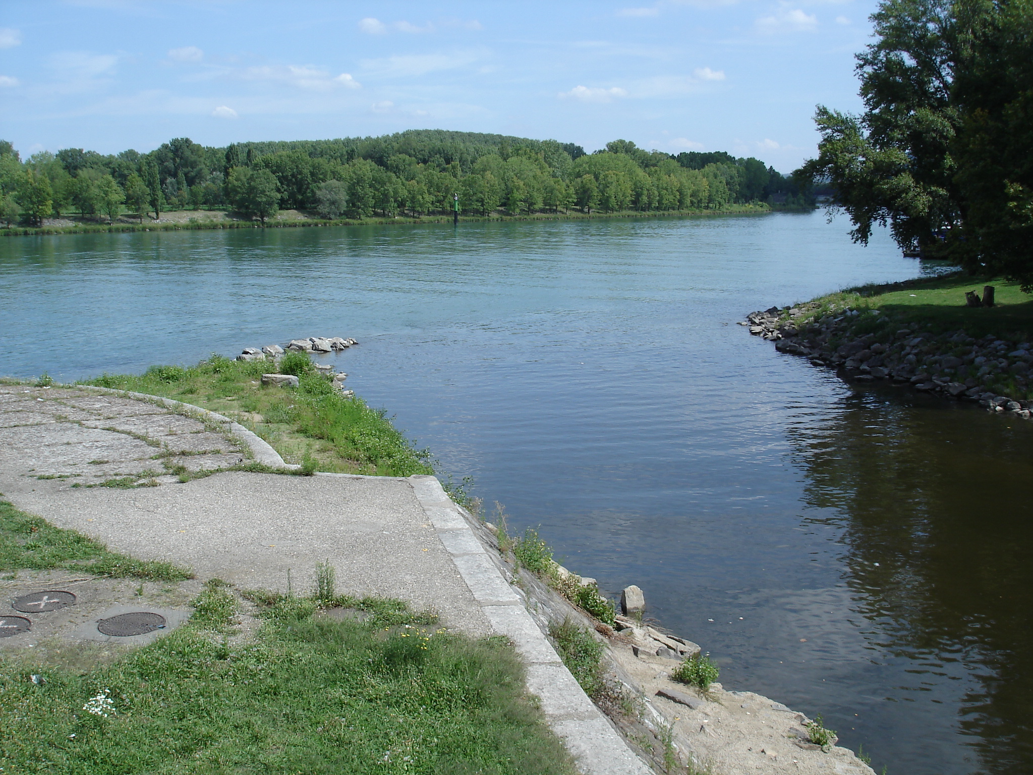 Confluence du Rhône et du Gier à Givors (Rhône, France)